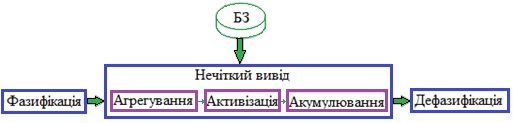 рис2